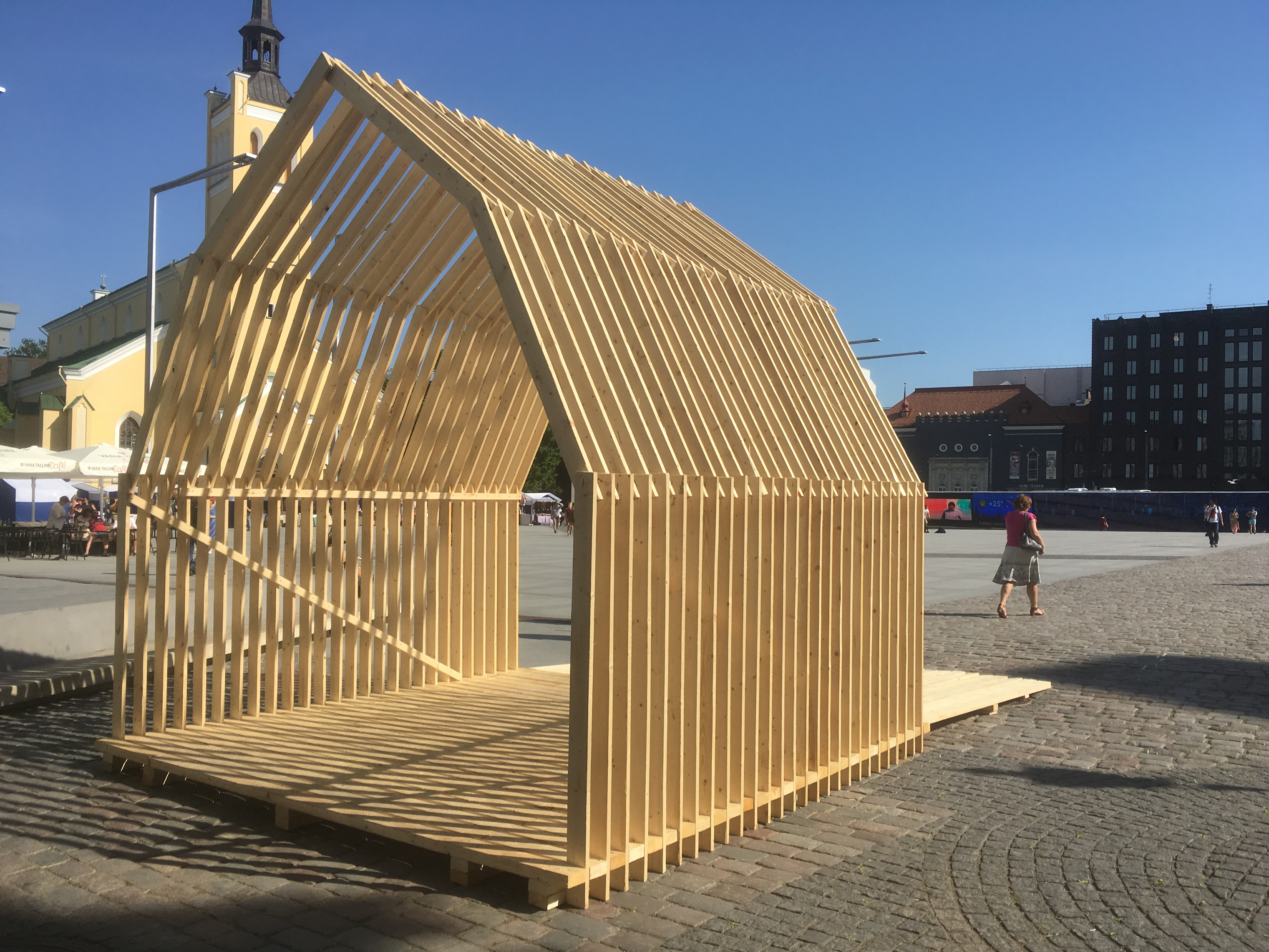 Harju värav, Elo Liivi installatsioon Tallinna Vanalinnas, 2016